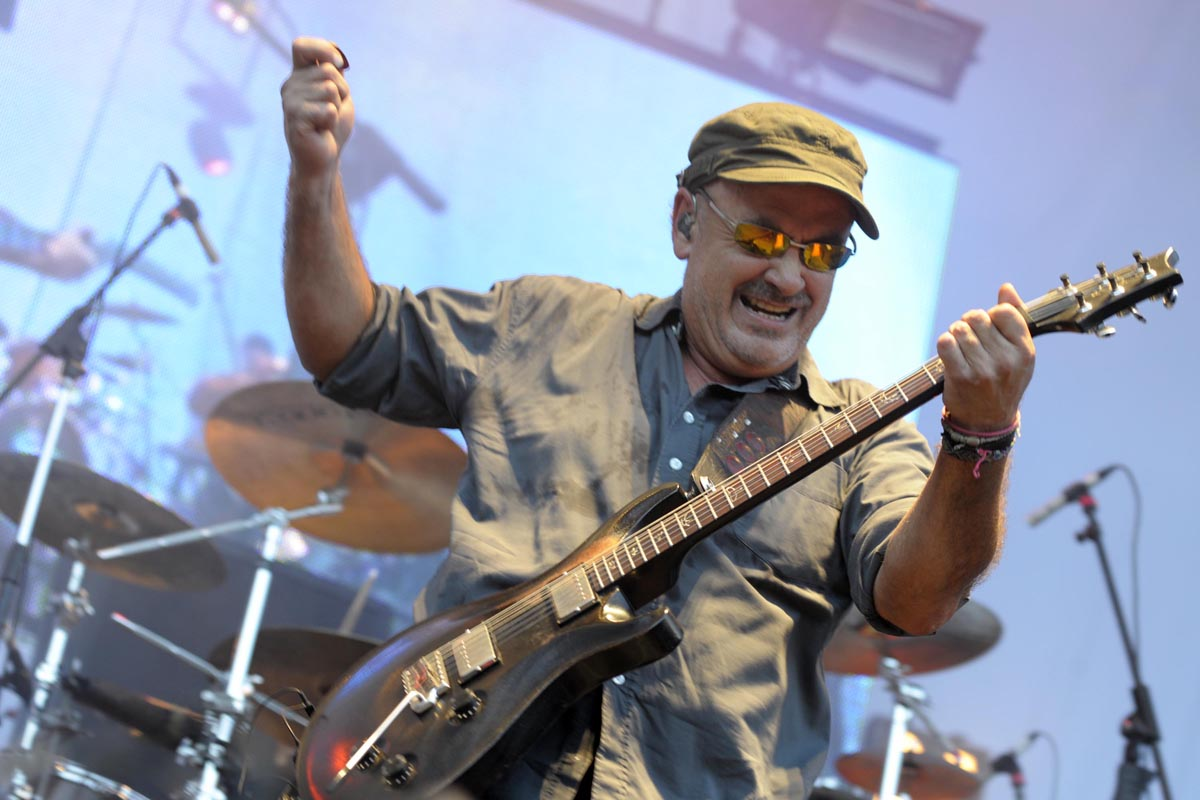 Surgidos de la disolución de Sumo, grupo que cambió el curso del Rock Nacional en los 80’s, Las Pelotas es una de las bandas más convocantes y referente del rock en Argentina. ( Foto: Federico Hamilton)